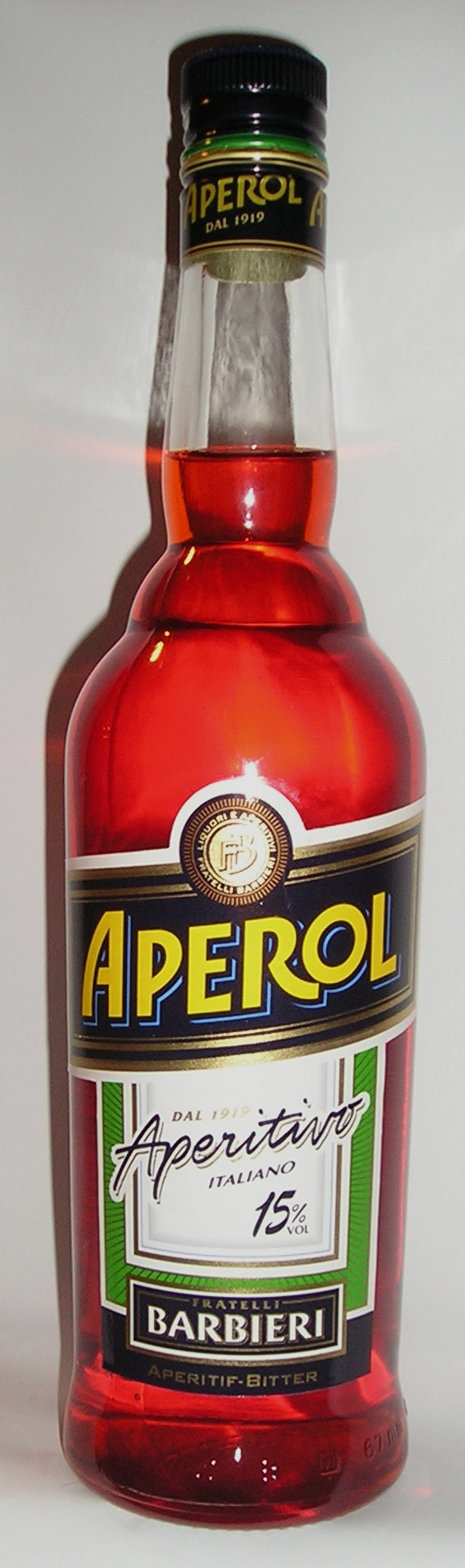 Flasche Aperol Sonstiges: neu, da statt mit 11% nun 15% alkohol